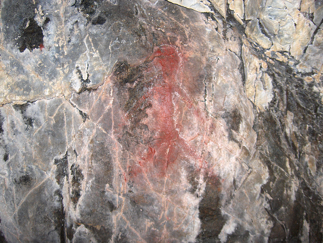 Et av i alt 46 hulemalerier i Fingalshula